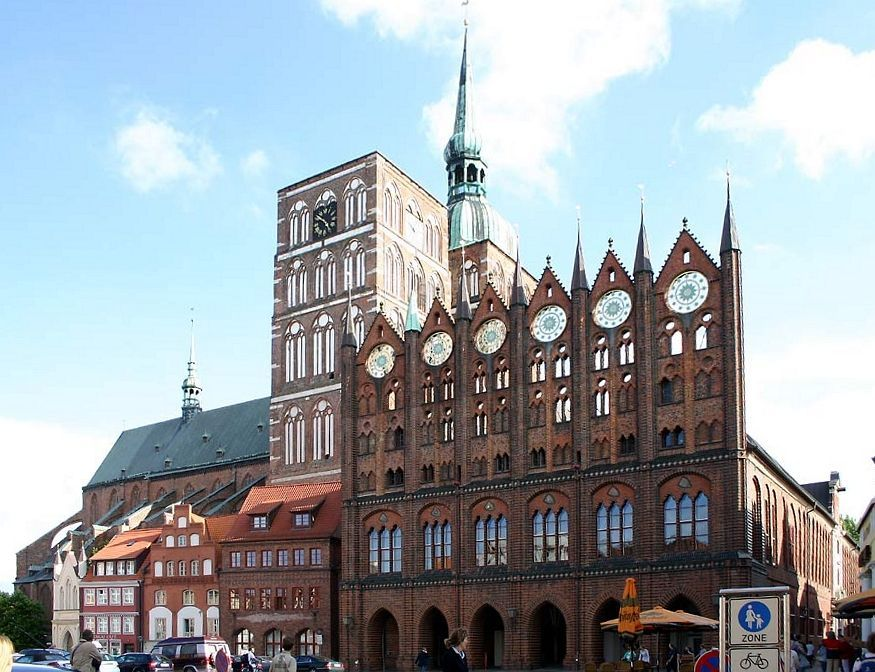 Stralsund - Alter Markt Rechts im Bild ist das Rathaus zu sehen, links davon die Nikolaikirche. fotografiert von: Softeis GNU-FDL